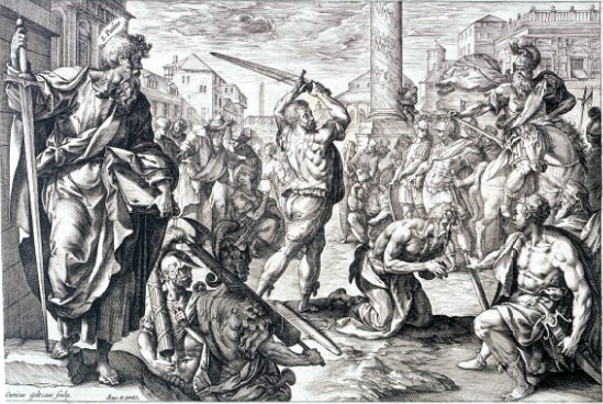 Saint Paul's martyrdom